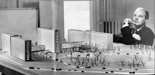 Arkitekten Sven Danielson med modell av Vattenfallsstyrelsens komplex i Råcksta